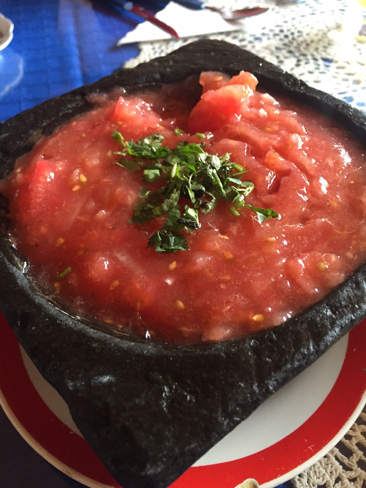 Piedra! Si !